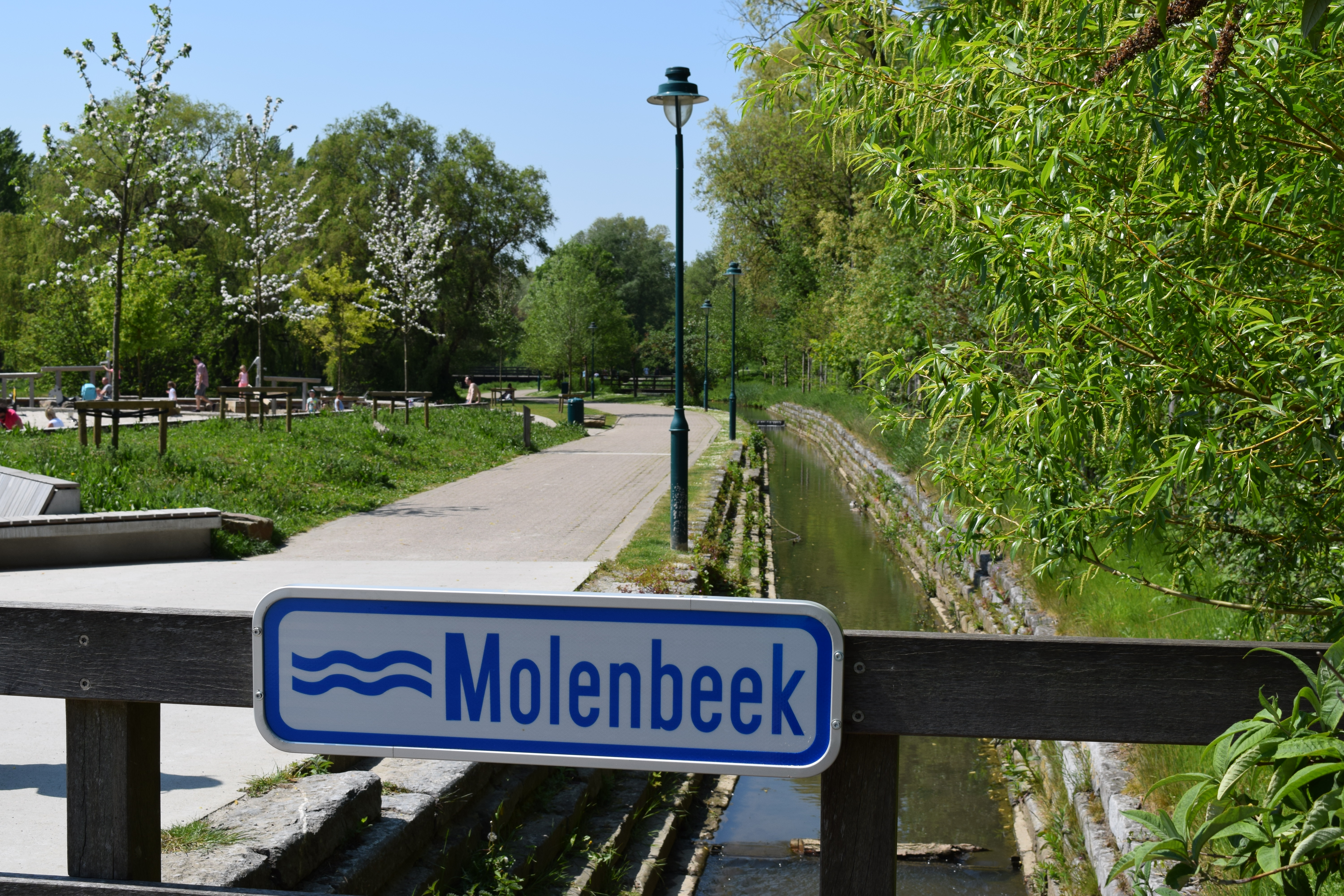 De Molenbeek in het Boudewijnpark in Jette (Brussel)